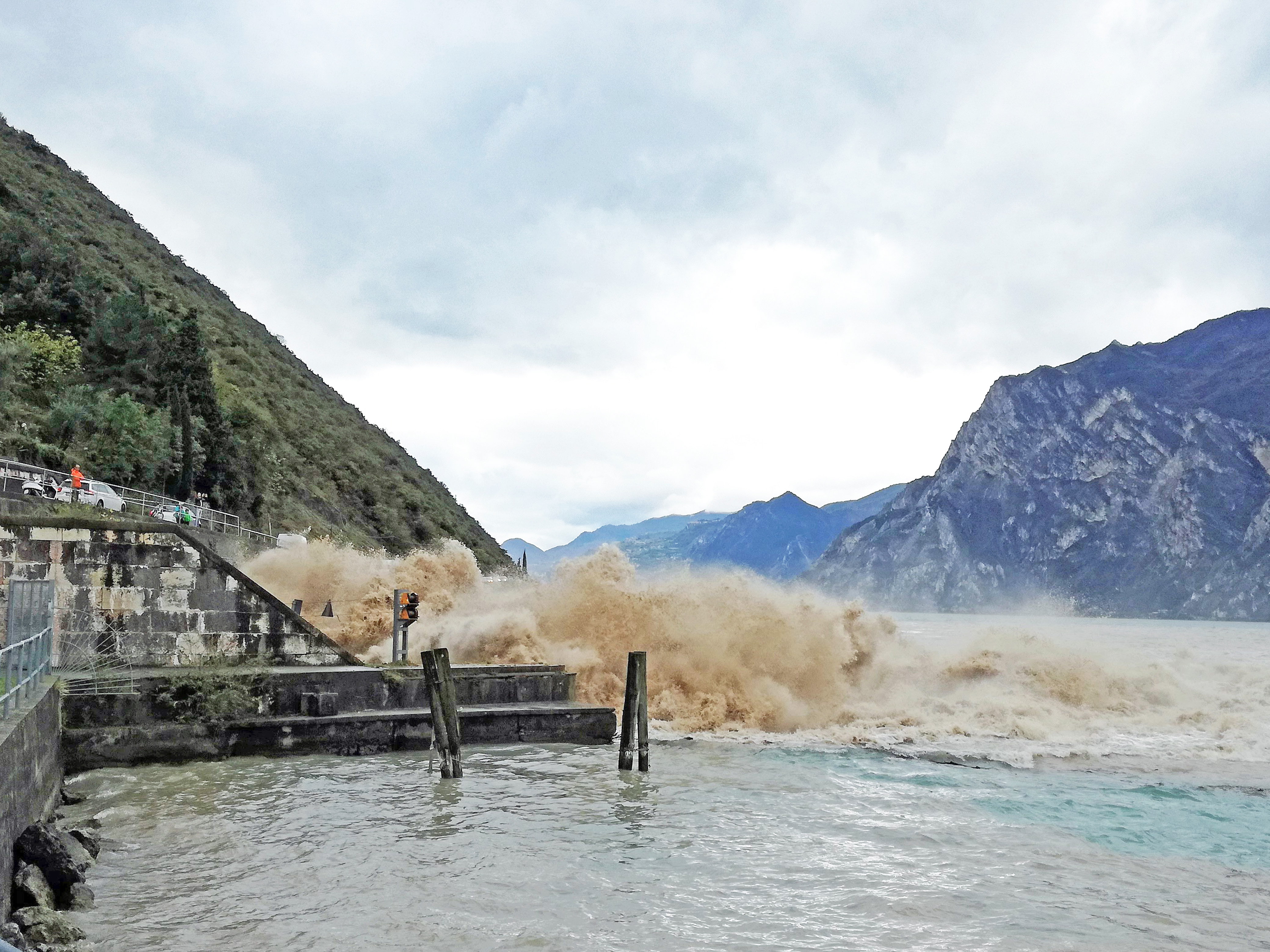 Etsch - Gardaseetunnel Hochwasser vom 30. Oktober 2018